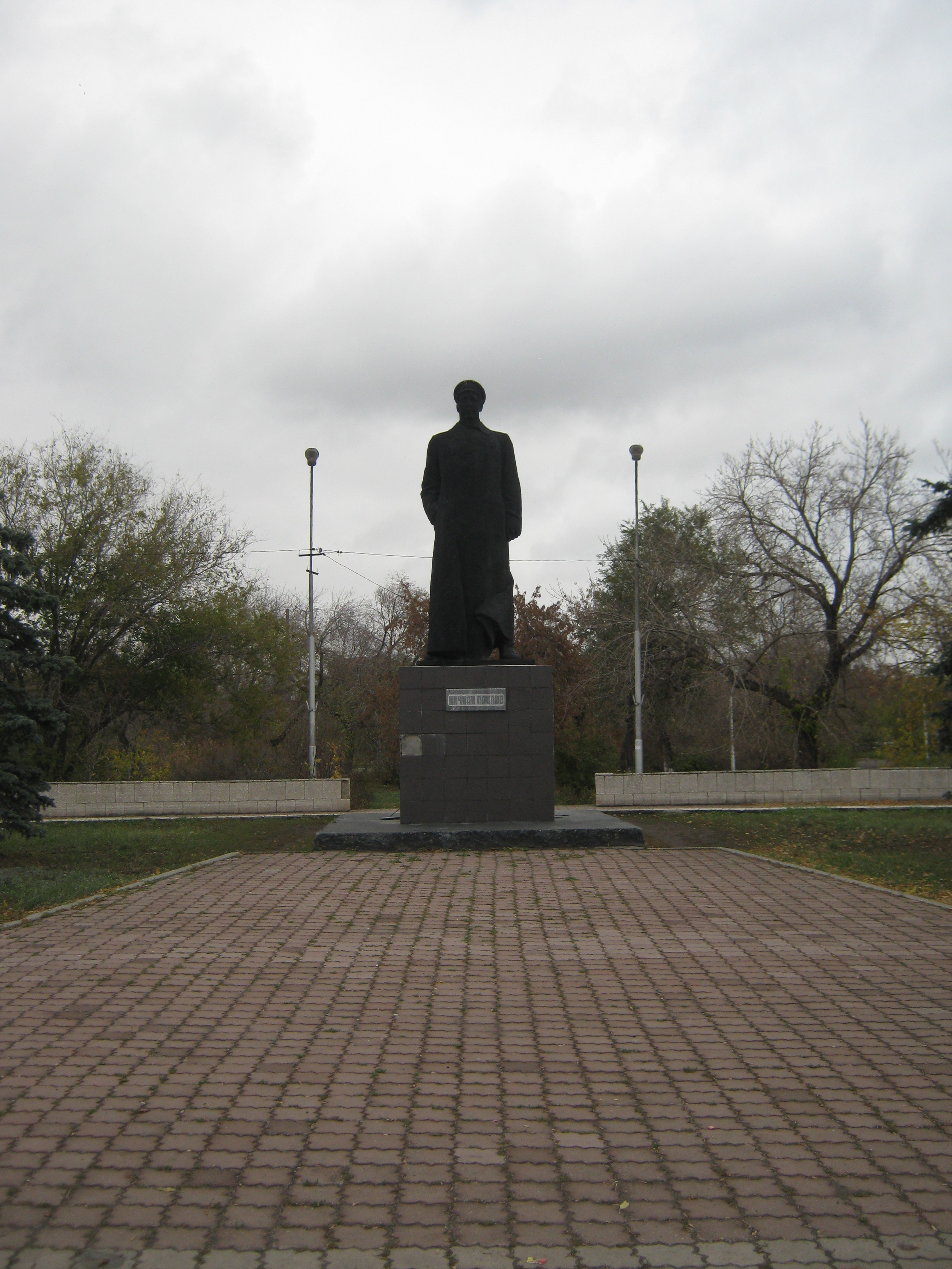 Памятник мичману С.Д.Павлову